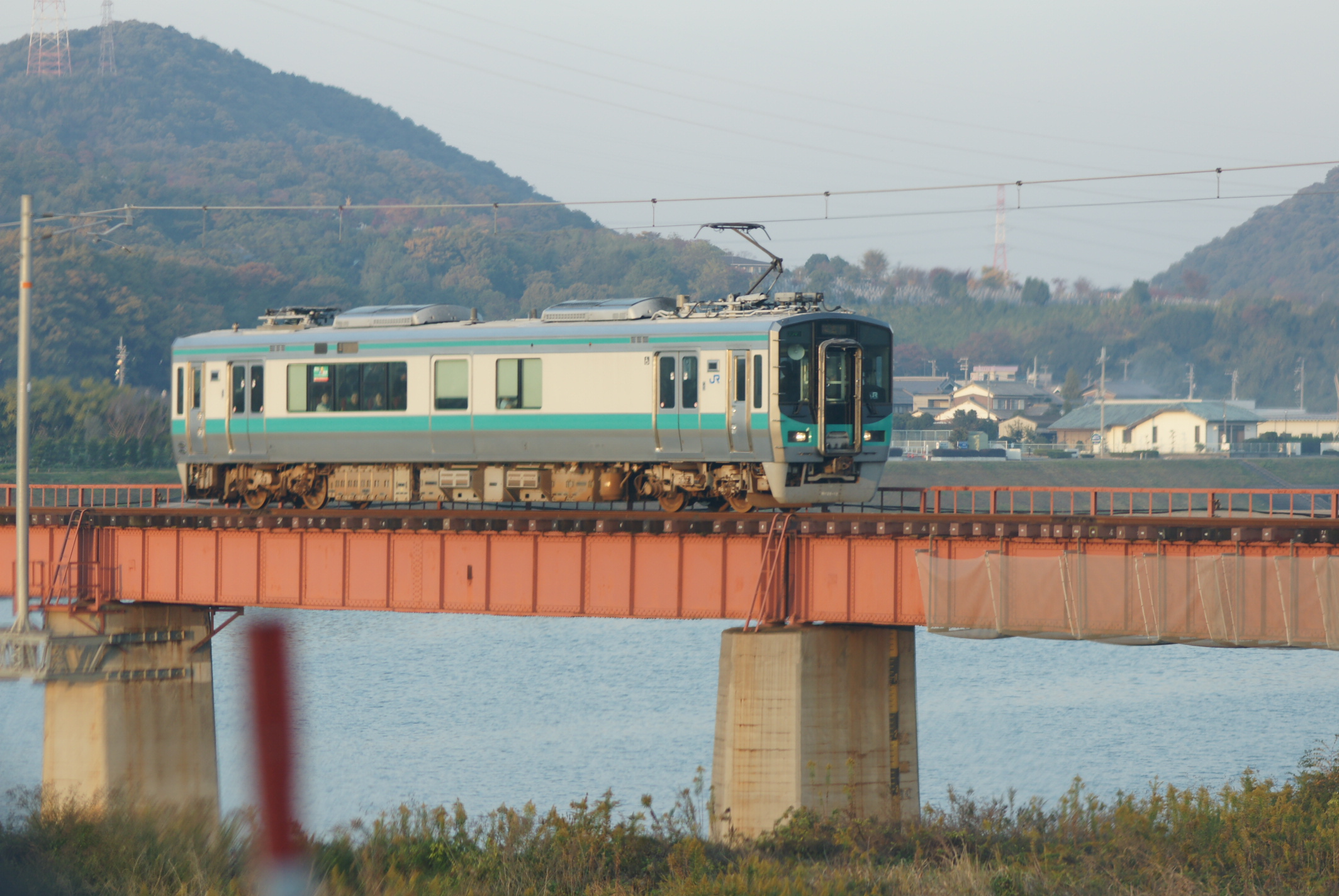 Kakogawa Line